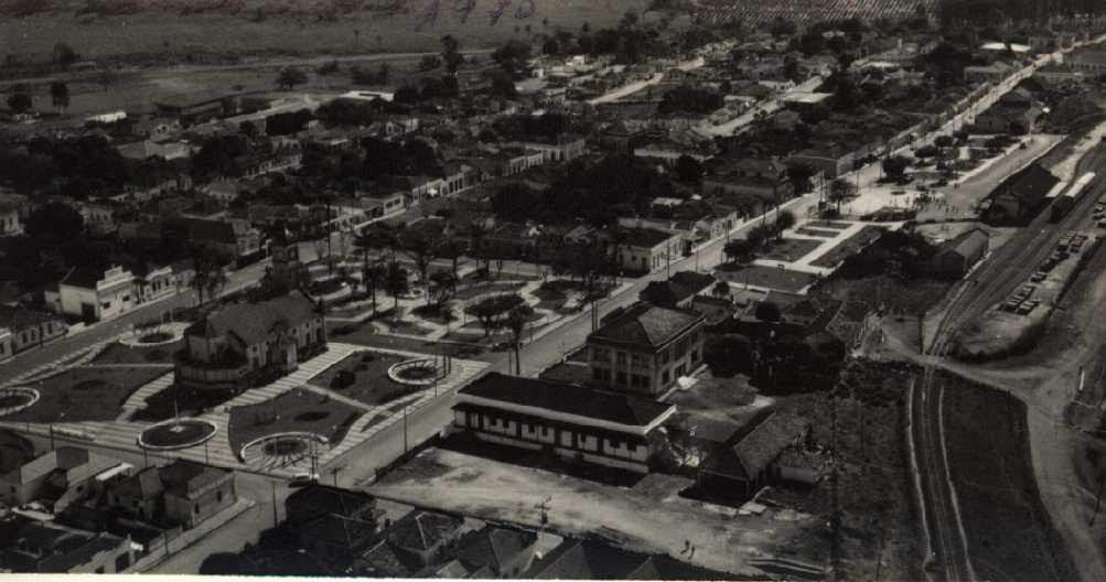 Vista da parte lateral da cidade com imagem da igreja matriz, fórum e estação ferroviária.